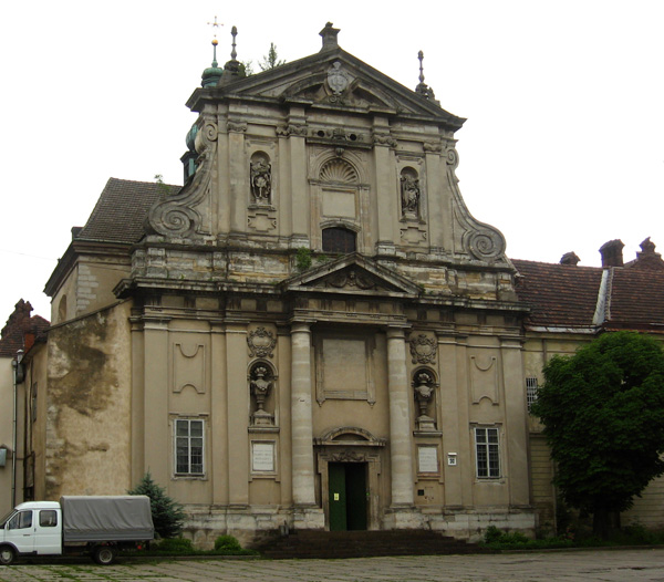 Carmelite Convent, Lviv